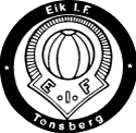 Dette er logoen til Eik-Tønsberg